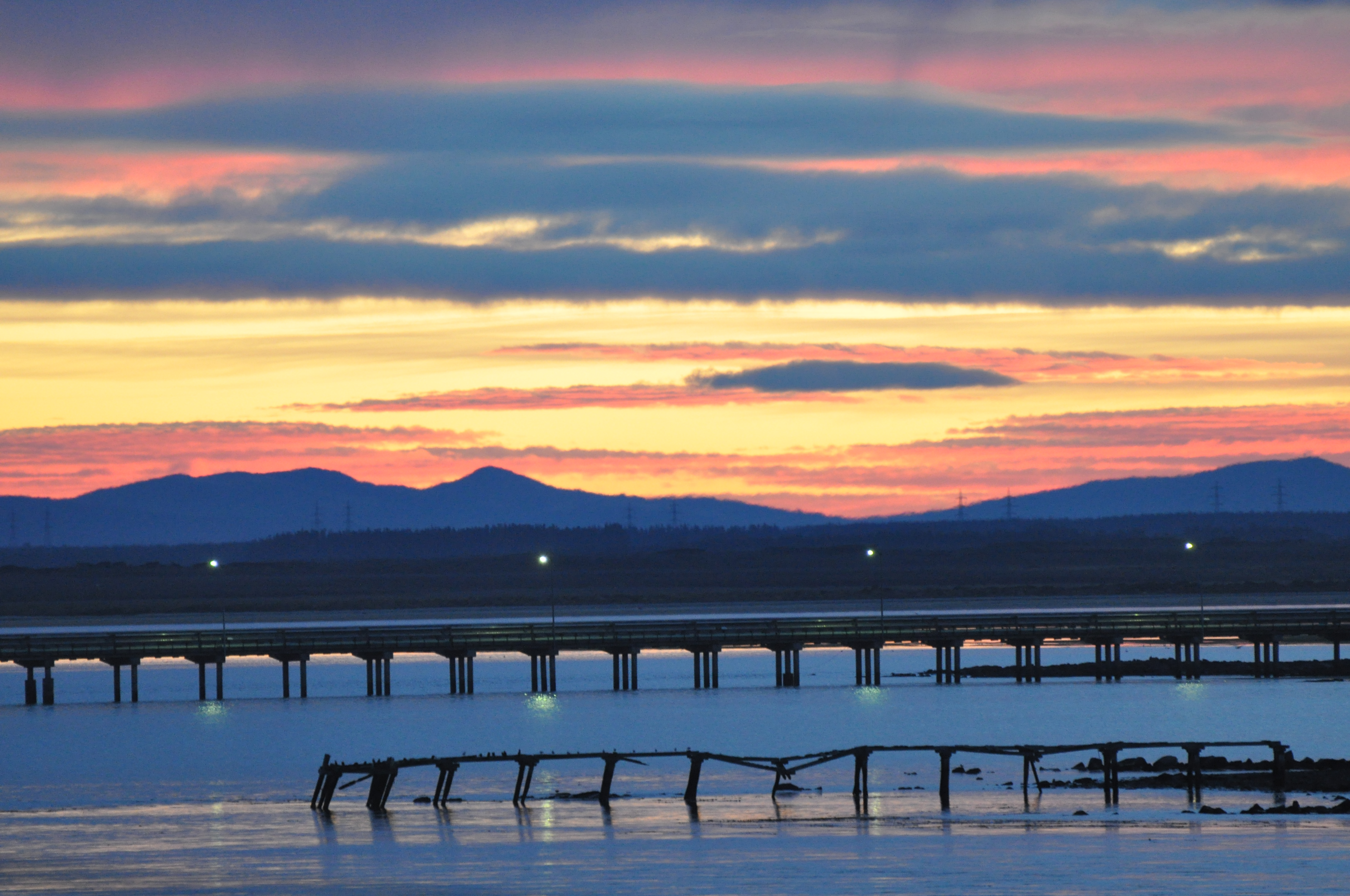 Daybreak